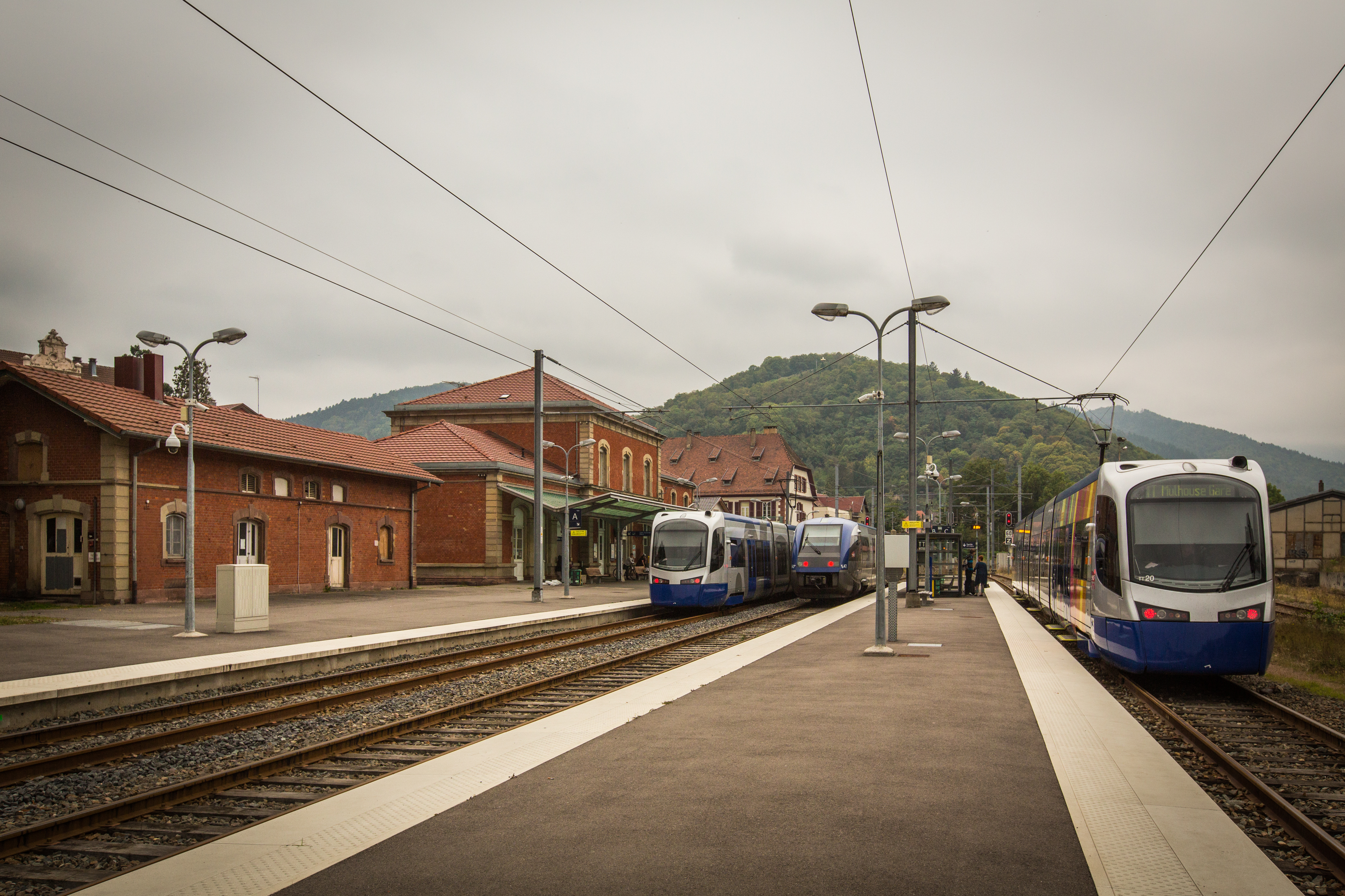 TER Alsace et Tram-Train en Gare SNCF de Thann le 29 septembre 2013.